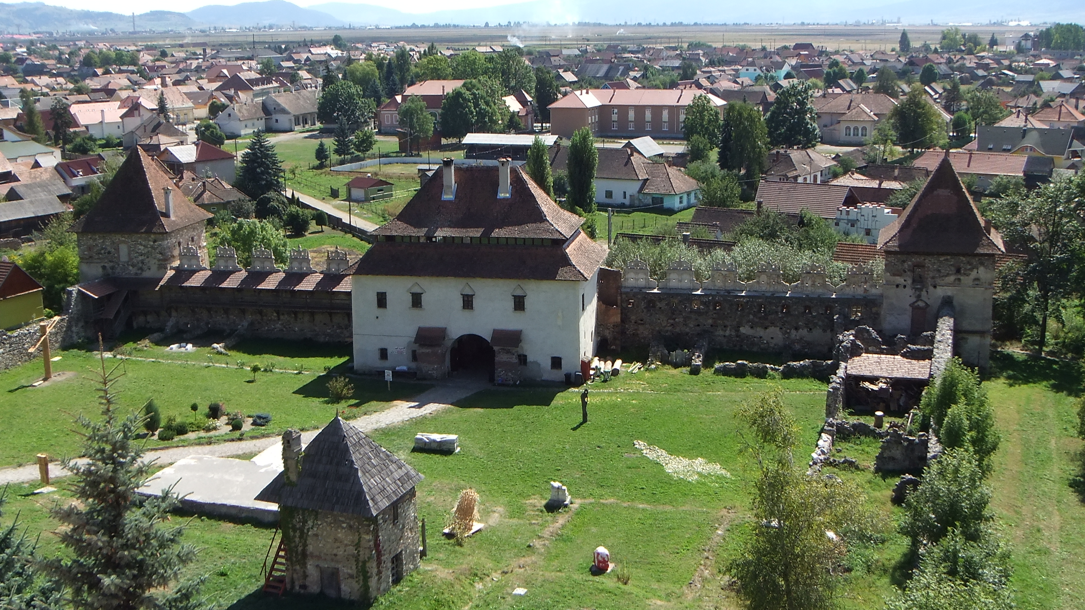 Ansamblu Portii de acces 01